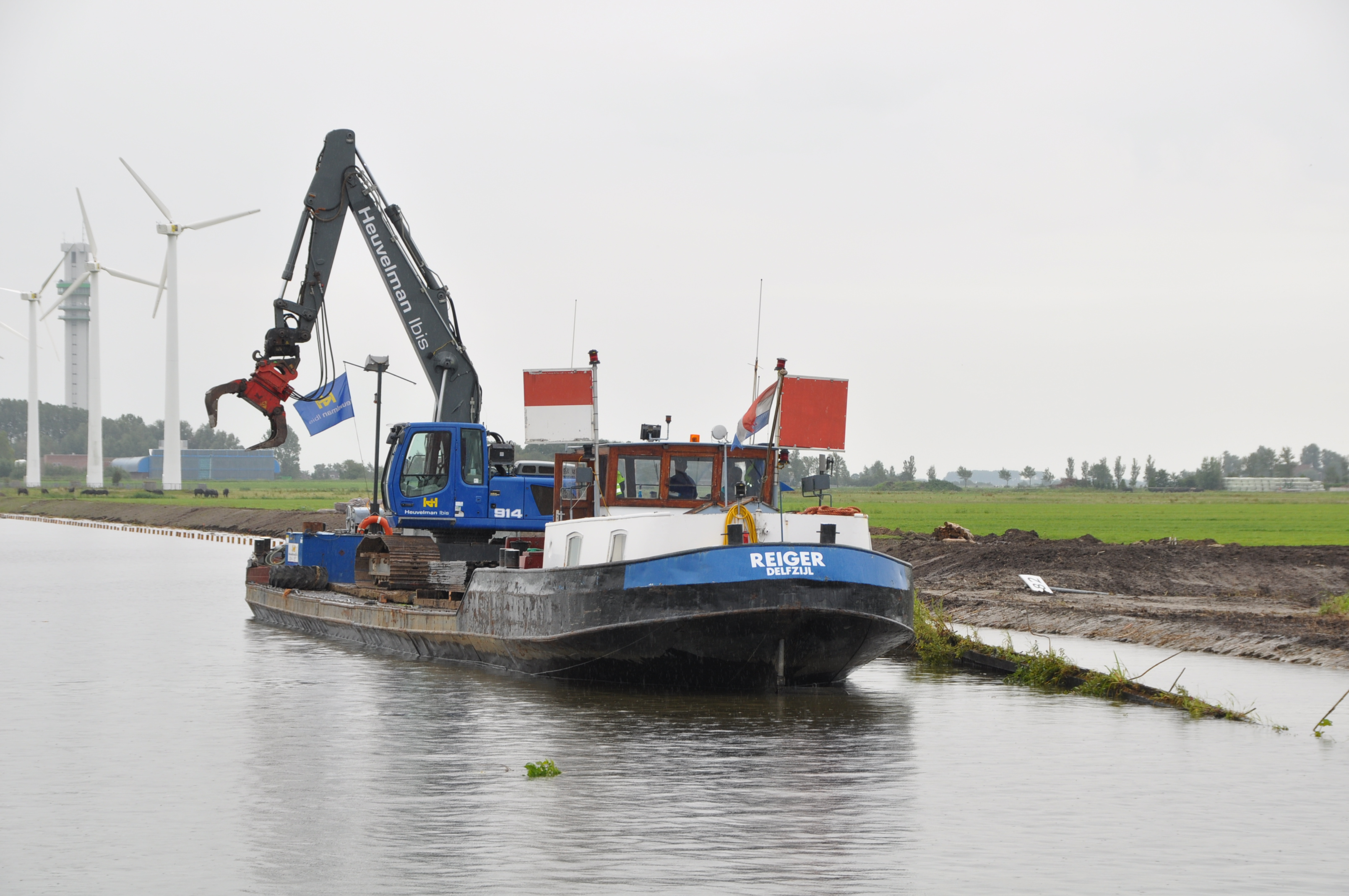 De REIGER aan het werk op het Prinses Margrietkanaal.